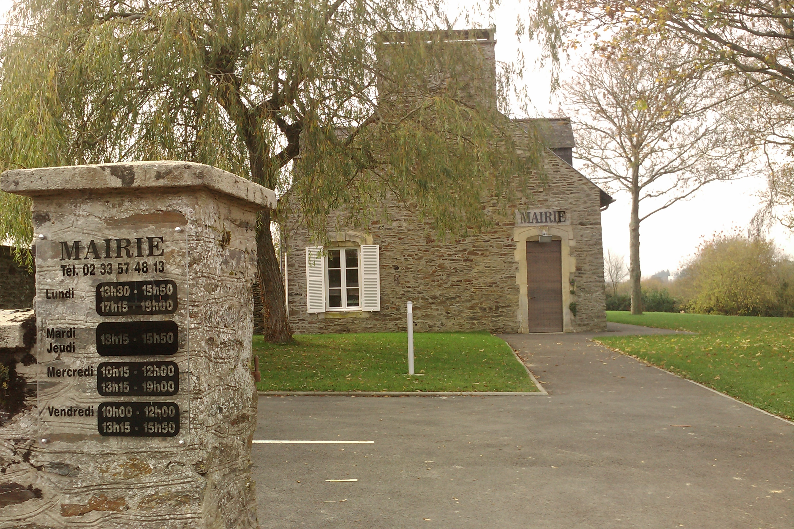 Église Saint-Ébremond de La Barre-de-Semilly